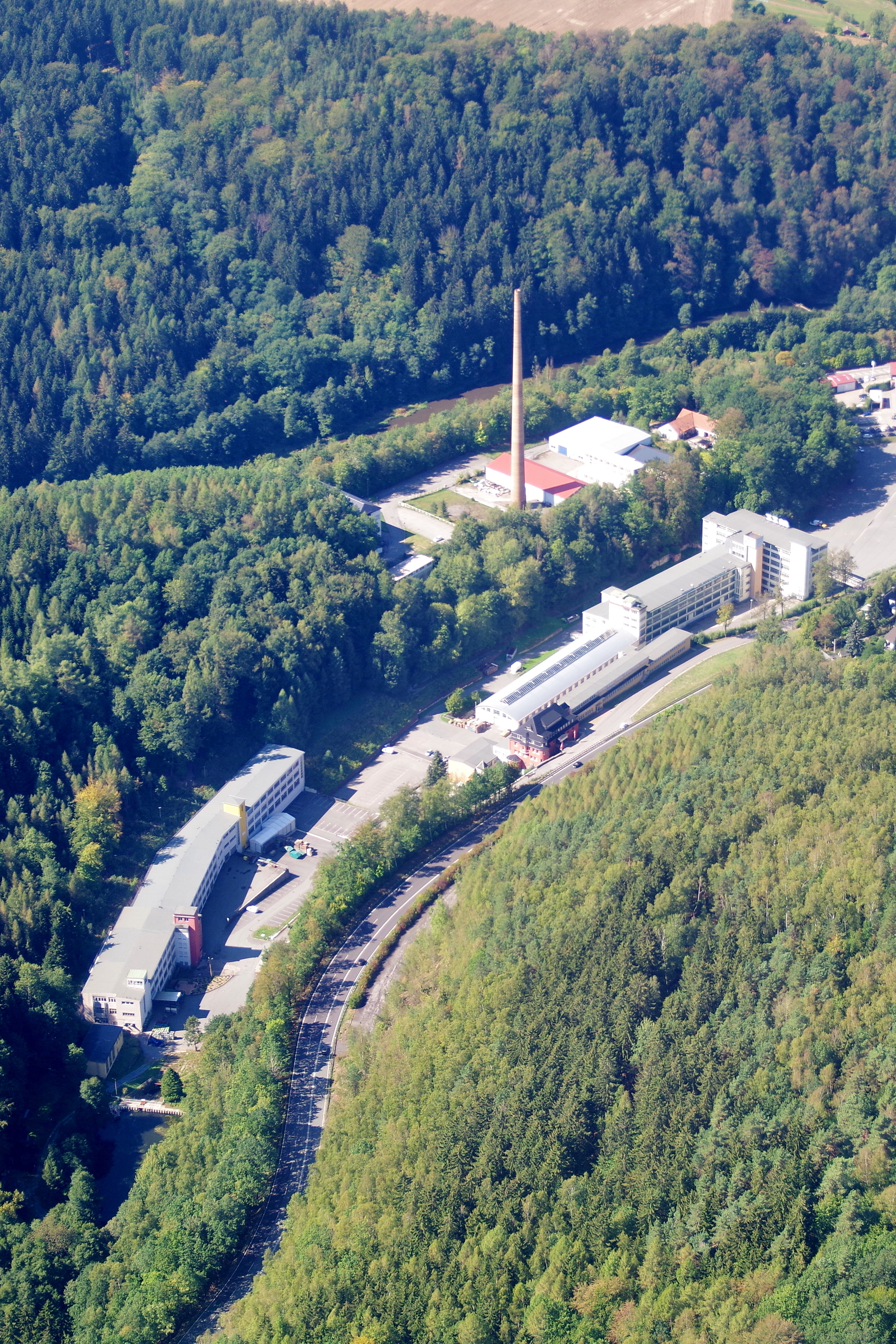 ehemaliges DKW- und späteres MZ-Werk in Zschopau